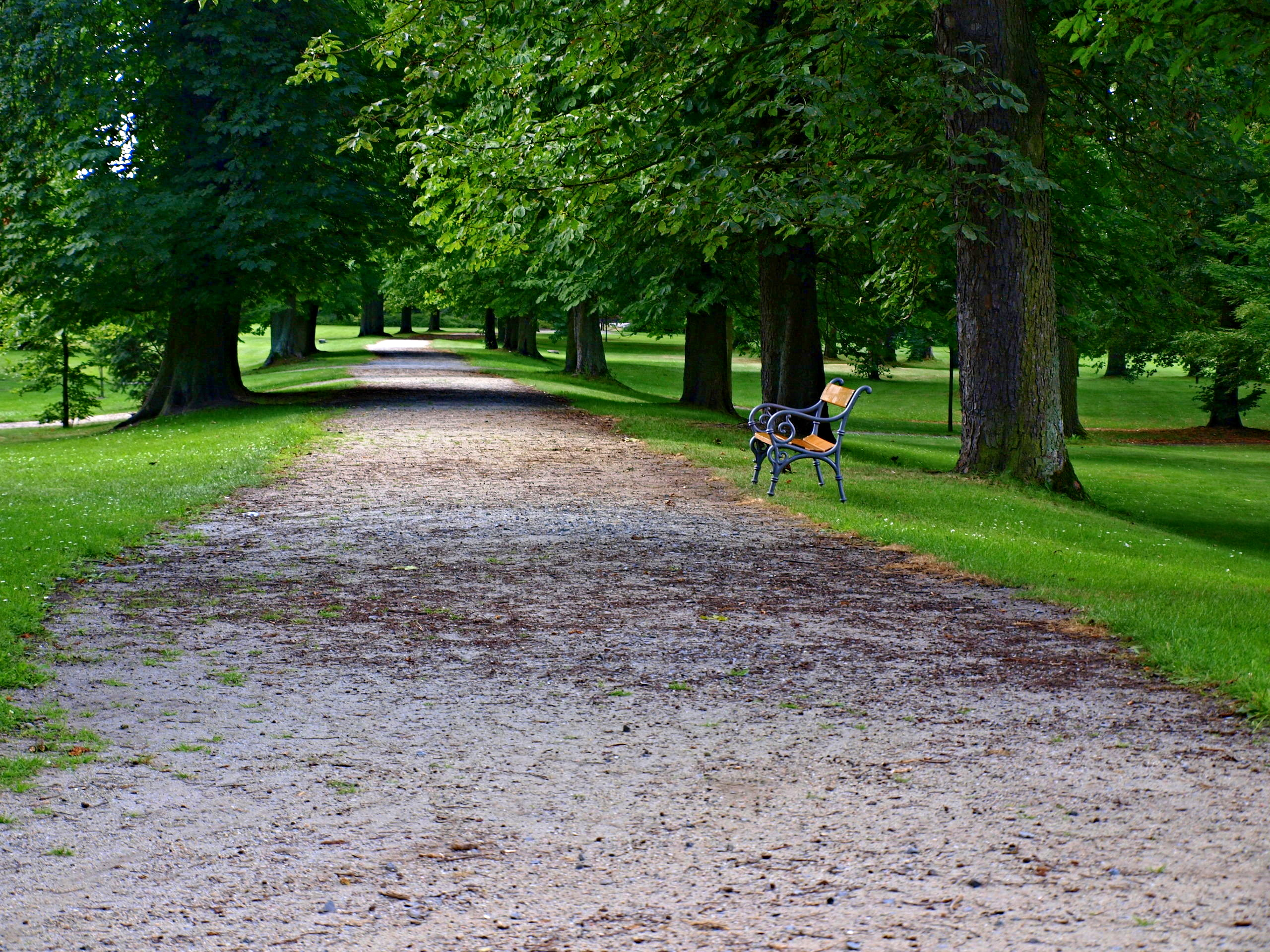 Zákupský zámecký park